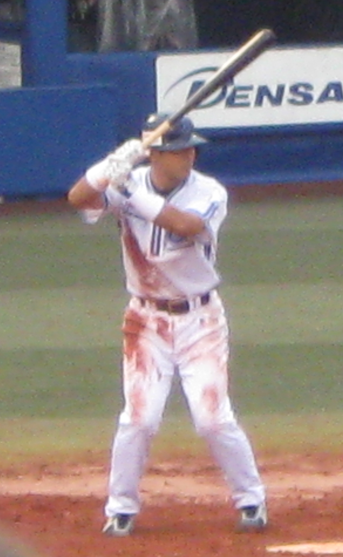 Toshihisa Nishi (仁志敏久)